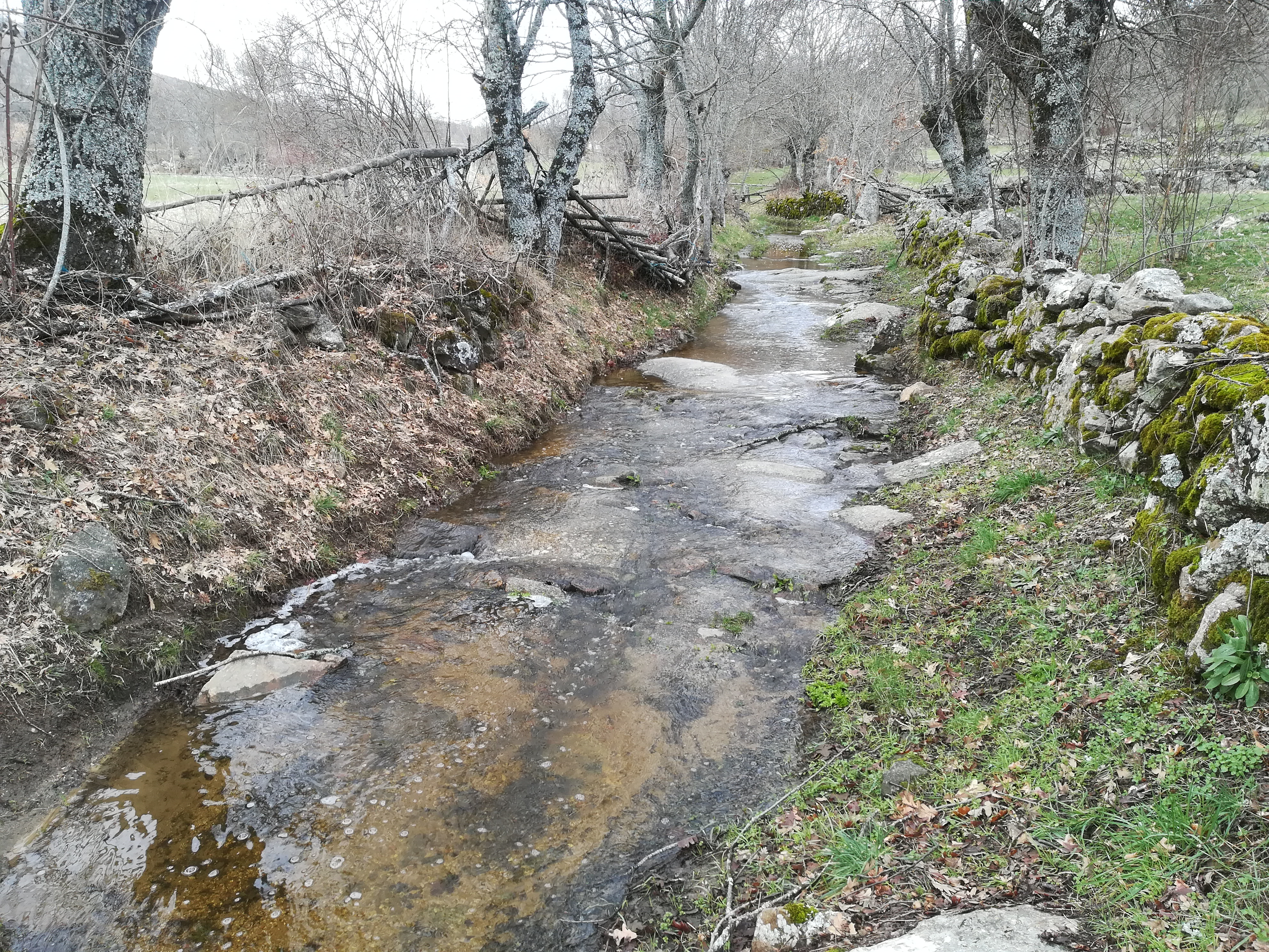 Regato Fresnedas antes de cruzar Vallejera de Riofrío